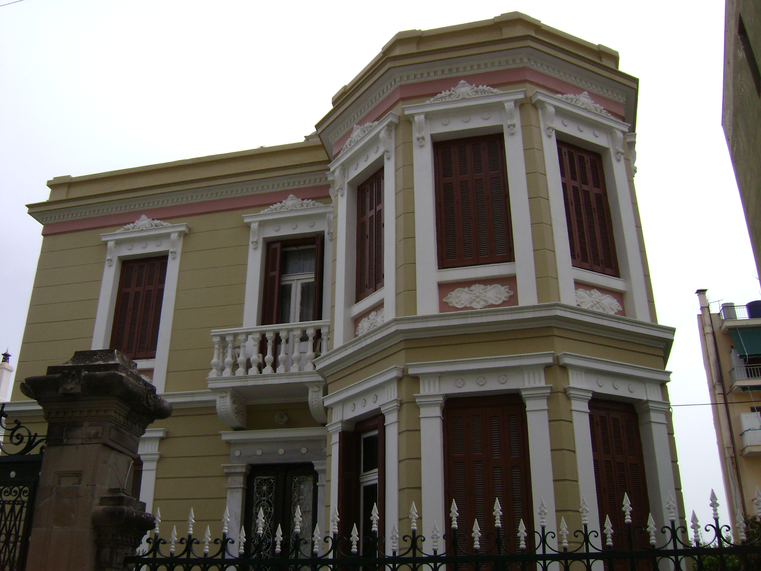 House on E.Vostani street in Mytilini.